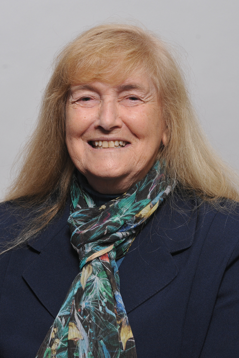 Portrait de Lucile Allorge-Boiteau